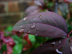 Illustration in truecolor